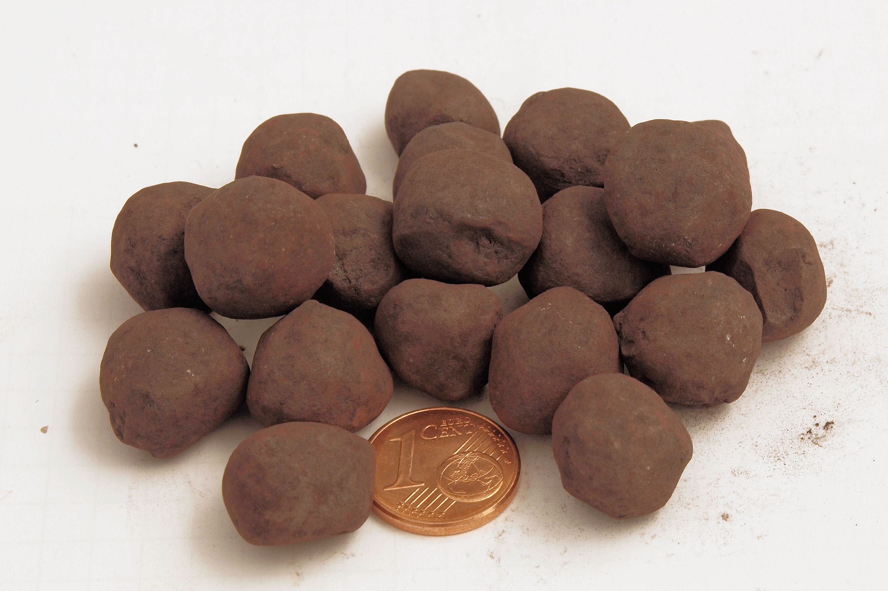 Eisenpellets, hergestellt durch die LKAB